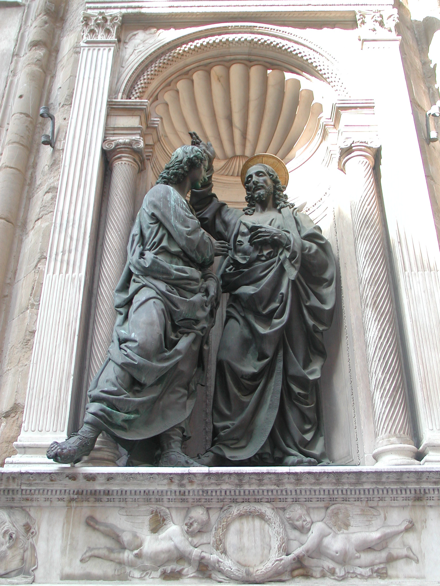 Tabernacolo dell'arte della Mercatanzia, con San Tommasogruppo scultore